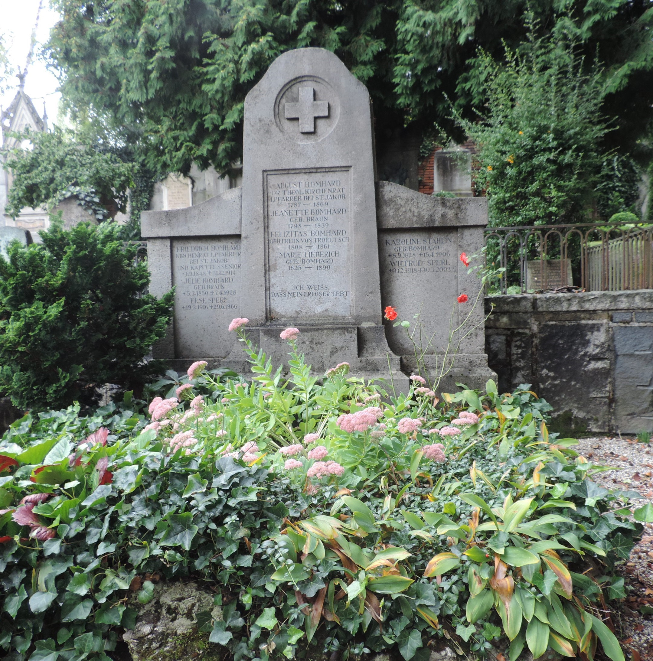 Familiengrabstätte Bomhard Manfi.B. 13. September 2014 eigene Arbeit